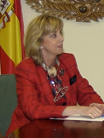 Carmen Frage, ehemalige Europaabgeordnete, hier als Generalsekretärin der Regierung für Fischerei